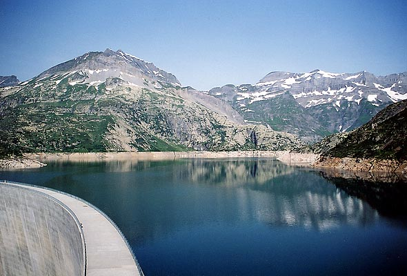 Lac d'Emosson